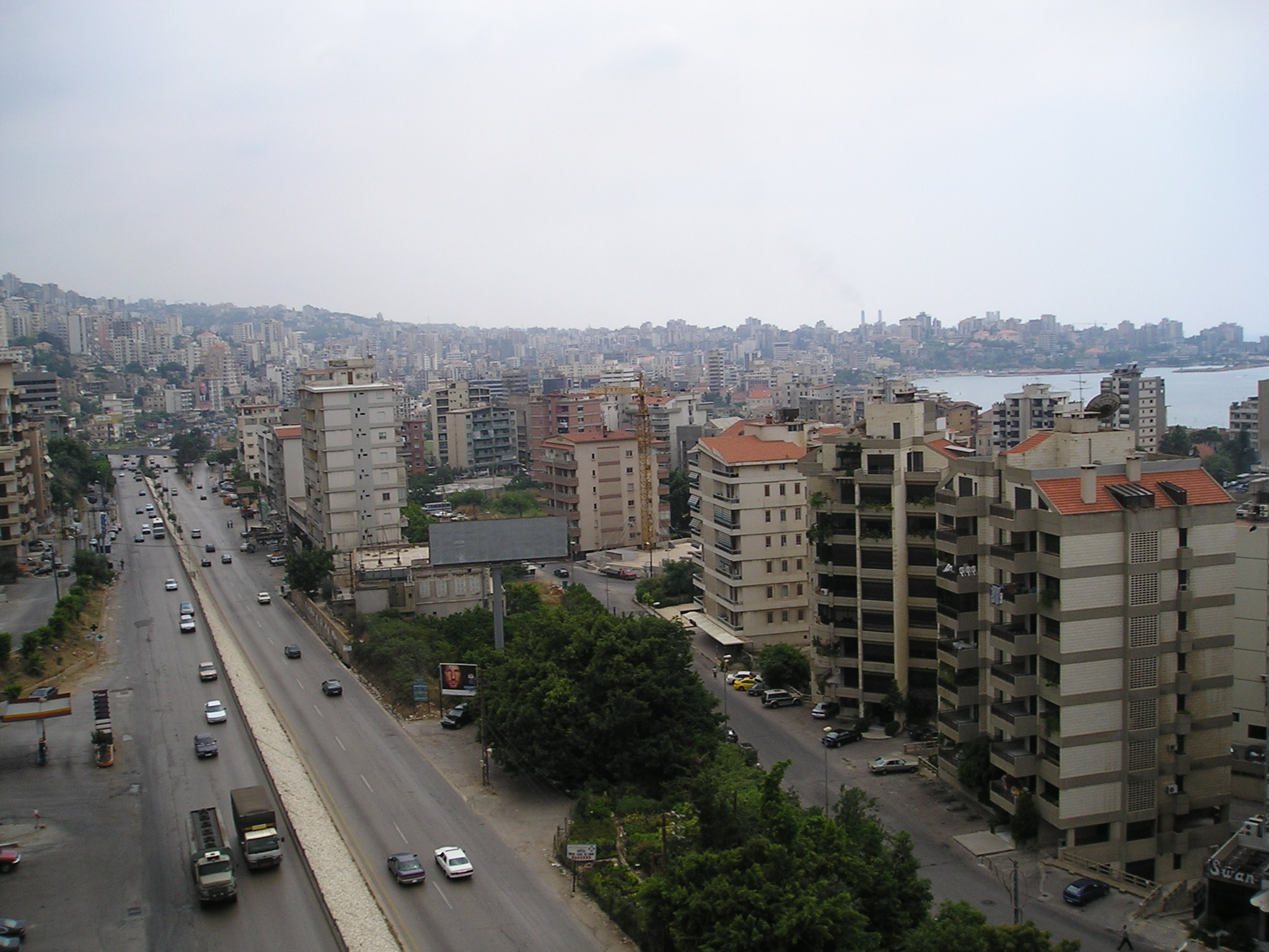 Summary Jounieh, Lebanon - Une vue de Jounieh prise du téléphérique en: Jounieh, Lebanon - a view from the Téléférique to south sl: Jounieh, Libanon - pogled s kabinske žičnice proti jugu mesta I took the photo myself